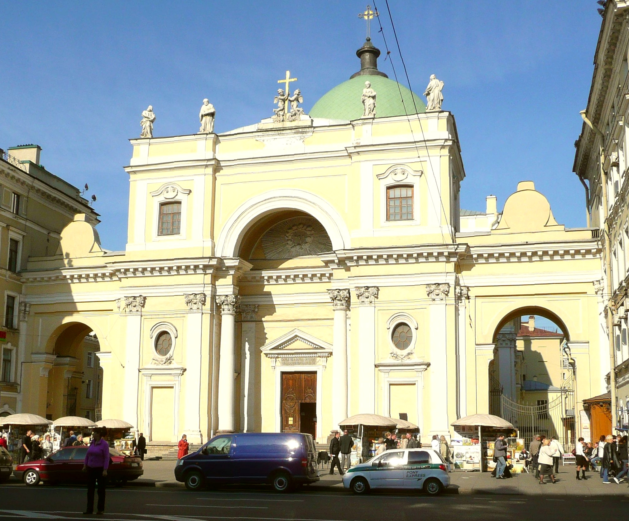 St.Katharinen-Kirche am Newski-Prospekt